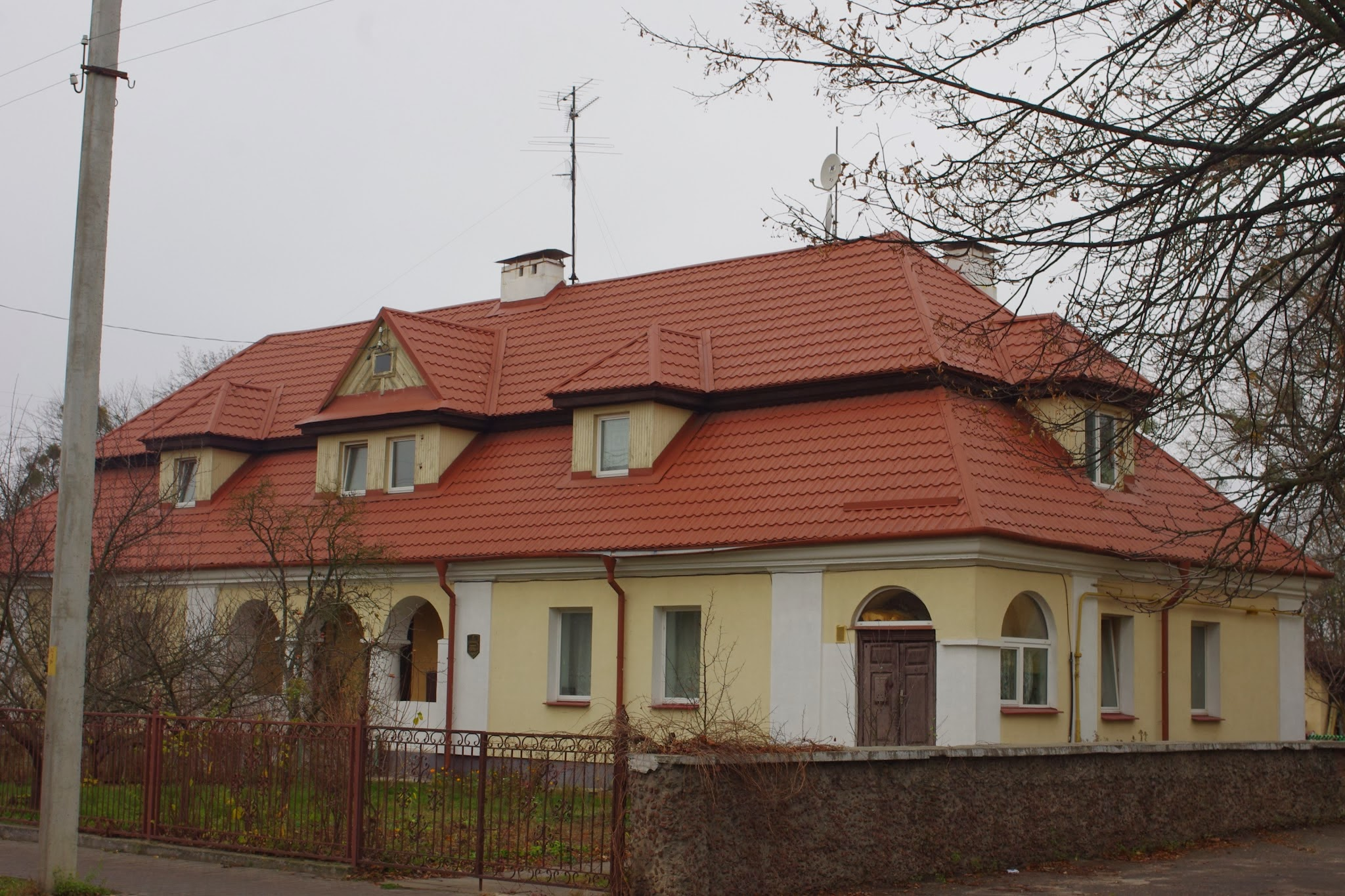 Lieninski rajon, Brest, Belarus